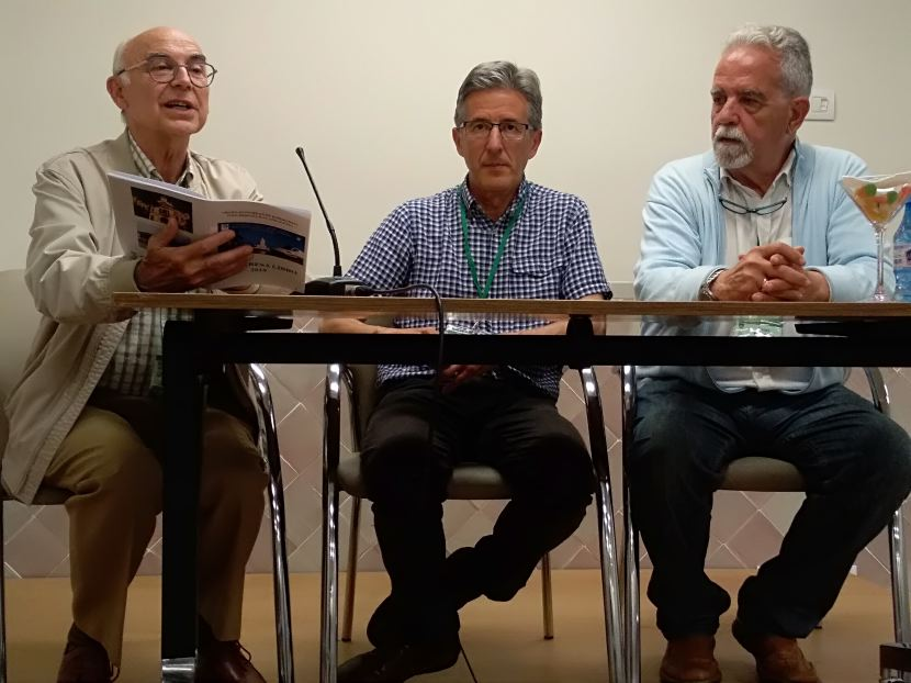 Spinola Barrio kaj Arquillos sur podio dum la 78-a Hispana Kongreso de Esperanto